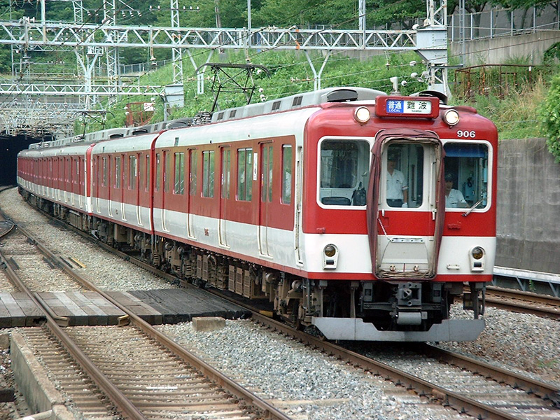 近鉄900系906F 2001年撮影 石切駅にて（投稿者が撮影）